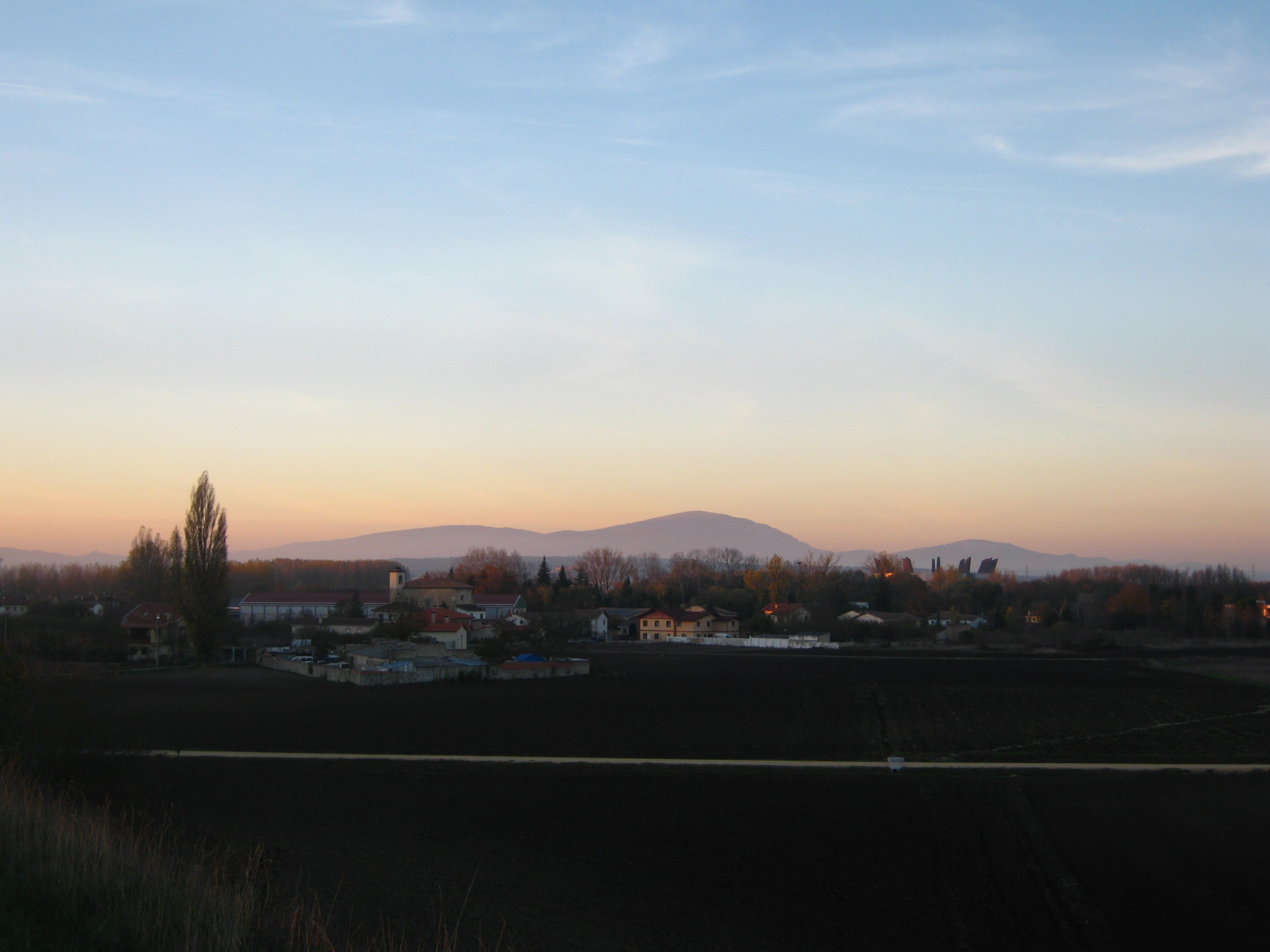 Atardecer en Arcaute (Álava, España)